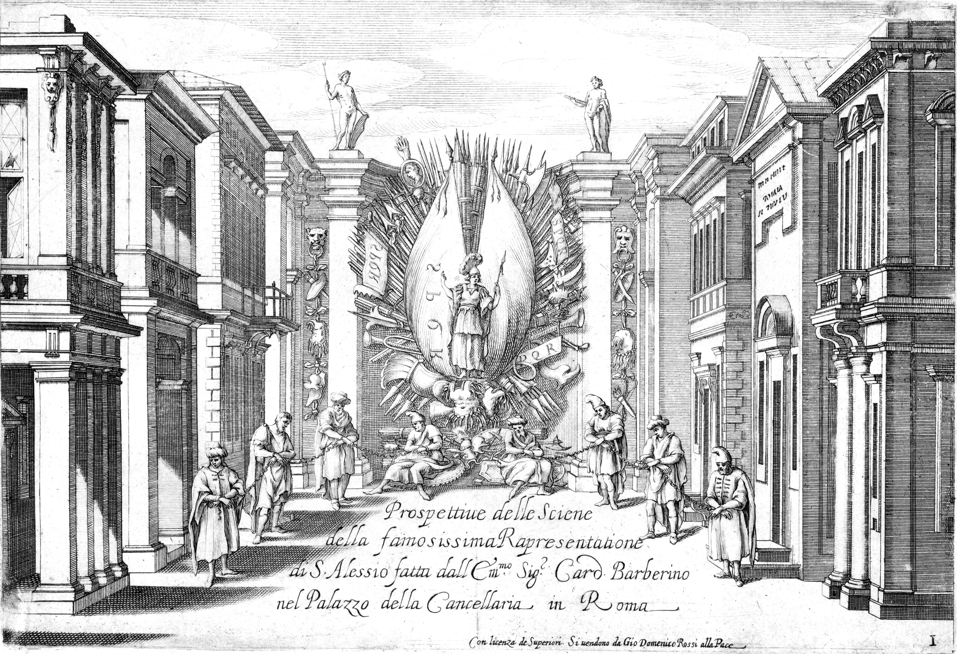 Stefano Landi - Il Sant'Alessio - Rome 1634 - Plate 1 - Prospettive delle scene